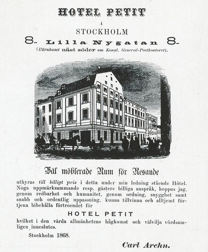 Hotell Petit, Munkbrogatan 7